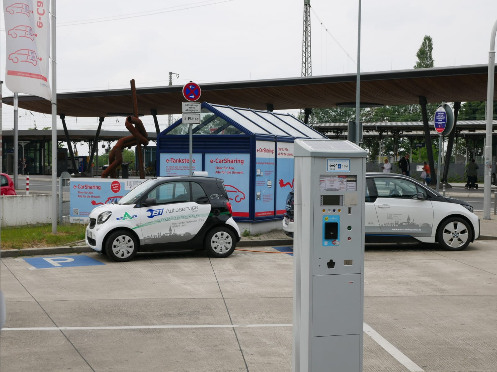 Einer der Eingänge in die Luftschutzanlage befindet sich in diesem Glashaus